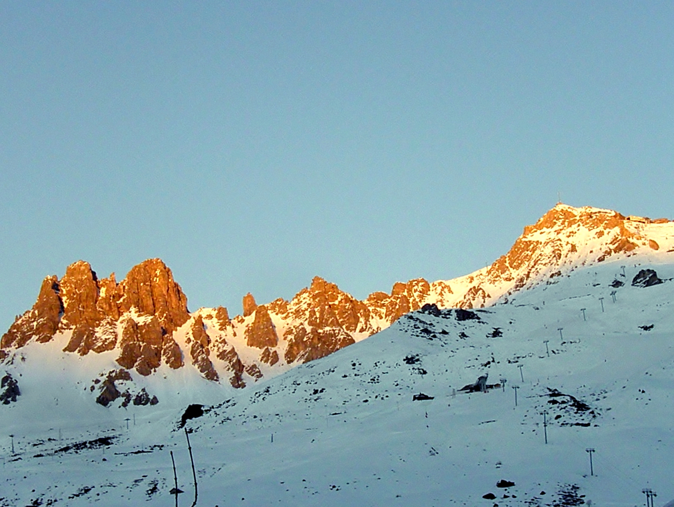 Dent de Burgin ou Croix de Verdon à gauche - Sommet de la Saulire à gauche. Côté Méribel-Mottaret